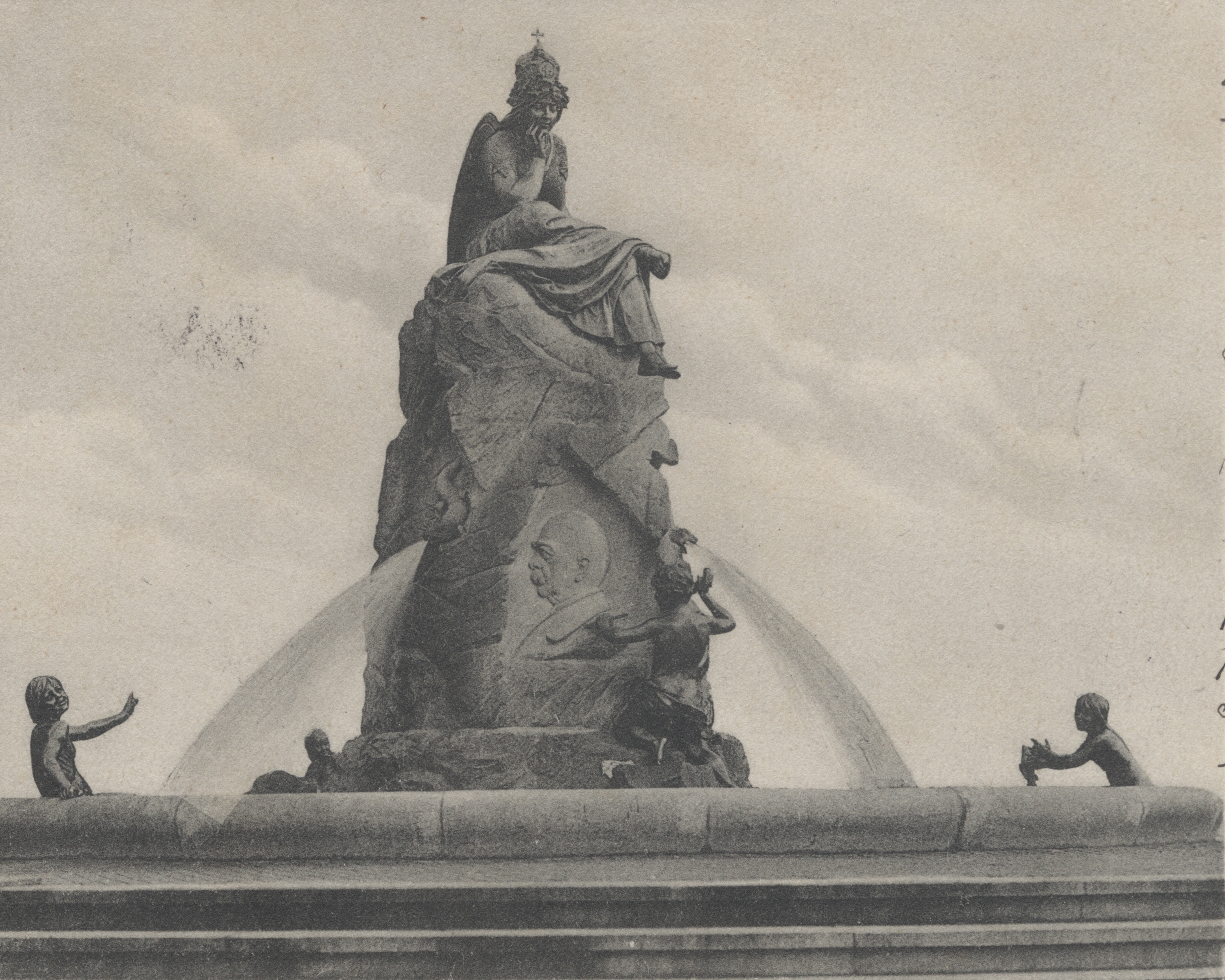 Foto Bismarckbrunnen von 1906 geerbt